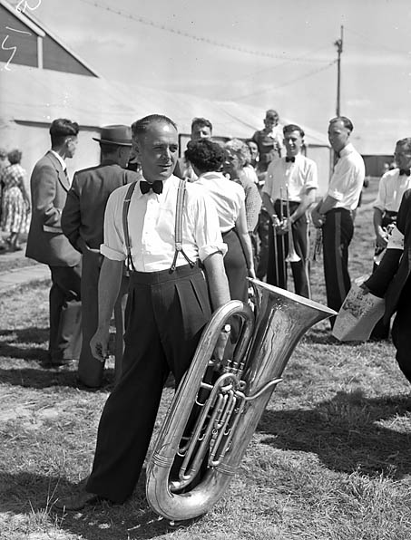 Teitl Cymraeg/Welsh title: Eisteddfod Genedlaethol Cymru 1956, Aberdâr Ffotograffydd/Photographer: Geoff Charles (1909-2002) Nodyn/Note: A brass band member with his tuba. Dyddiad/Date: August 6, 1956 Cyfrwng/Medium: Negydd ffilm / Film negative Cyfeiriad/Reference: (gch16327) Rhif cofnod / Record no.: 3370782 Rhagor o wybodaeth am gasgliad Geoff Charles yn Llyfrgell Genedlaethol Cymru More information about the Geoff Charles Collection at the National Library of Wales